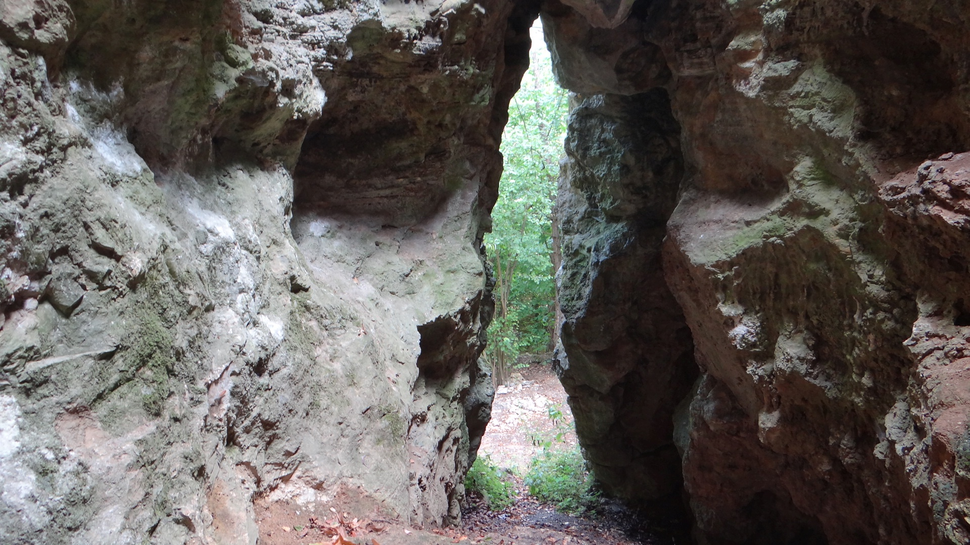 Komin Prawej Nogi Baby w skałach Dudnik w Podlesicach